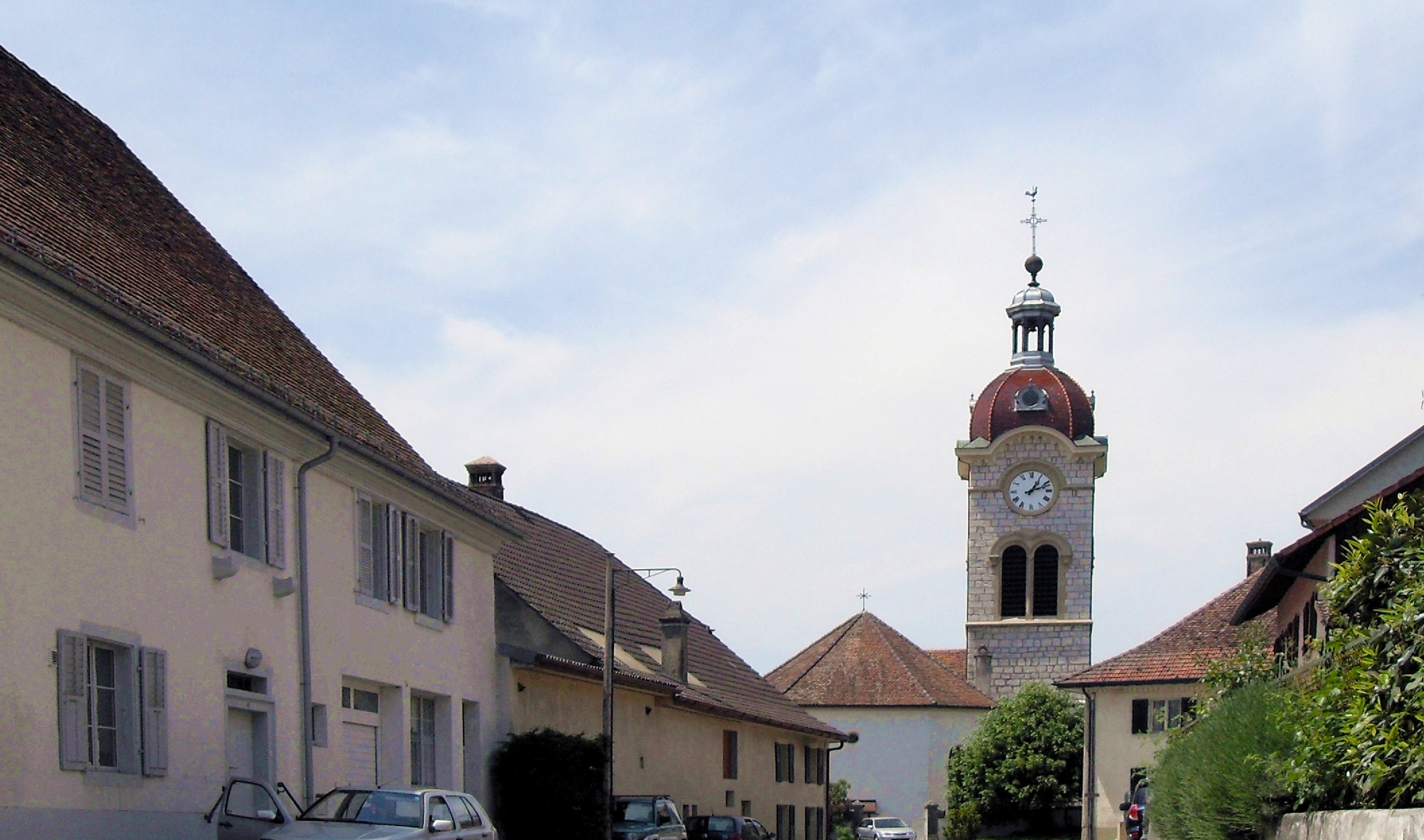 L'église Saint-Sébastien à Charmoille, commune de La Baroche, Suisse